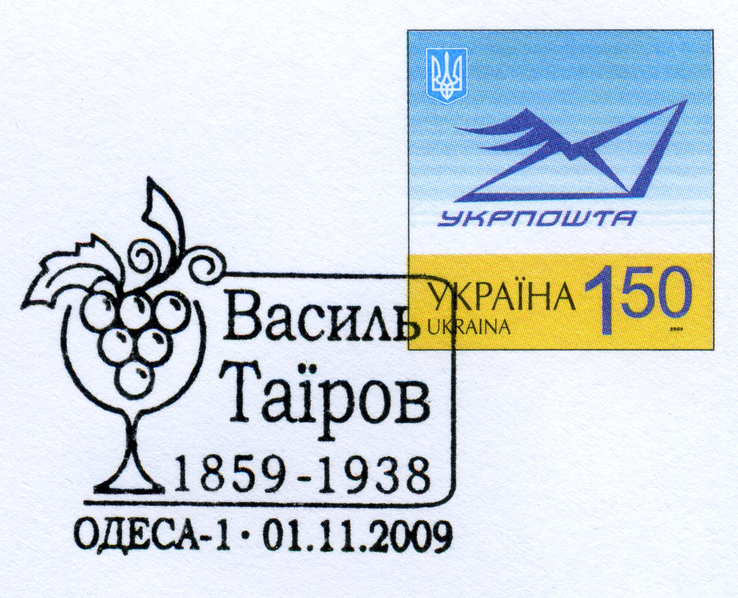 Специальное гашение Украины. 2009. Василий Таиров